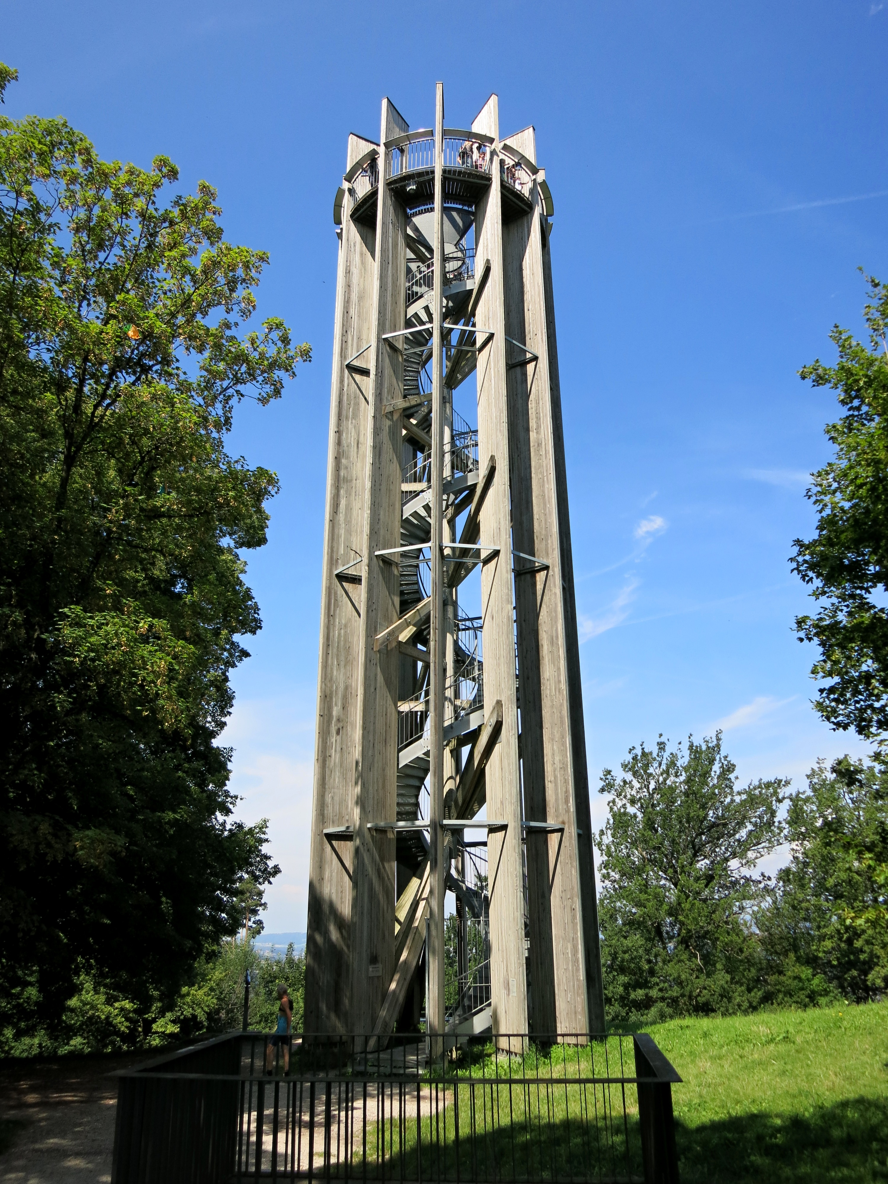 Gurtenturm